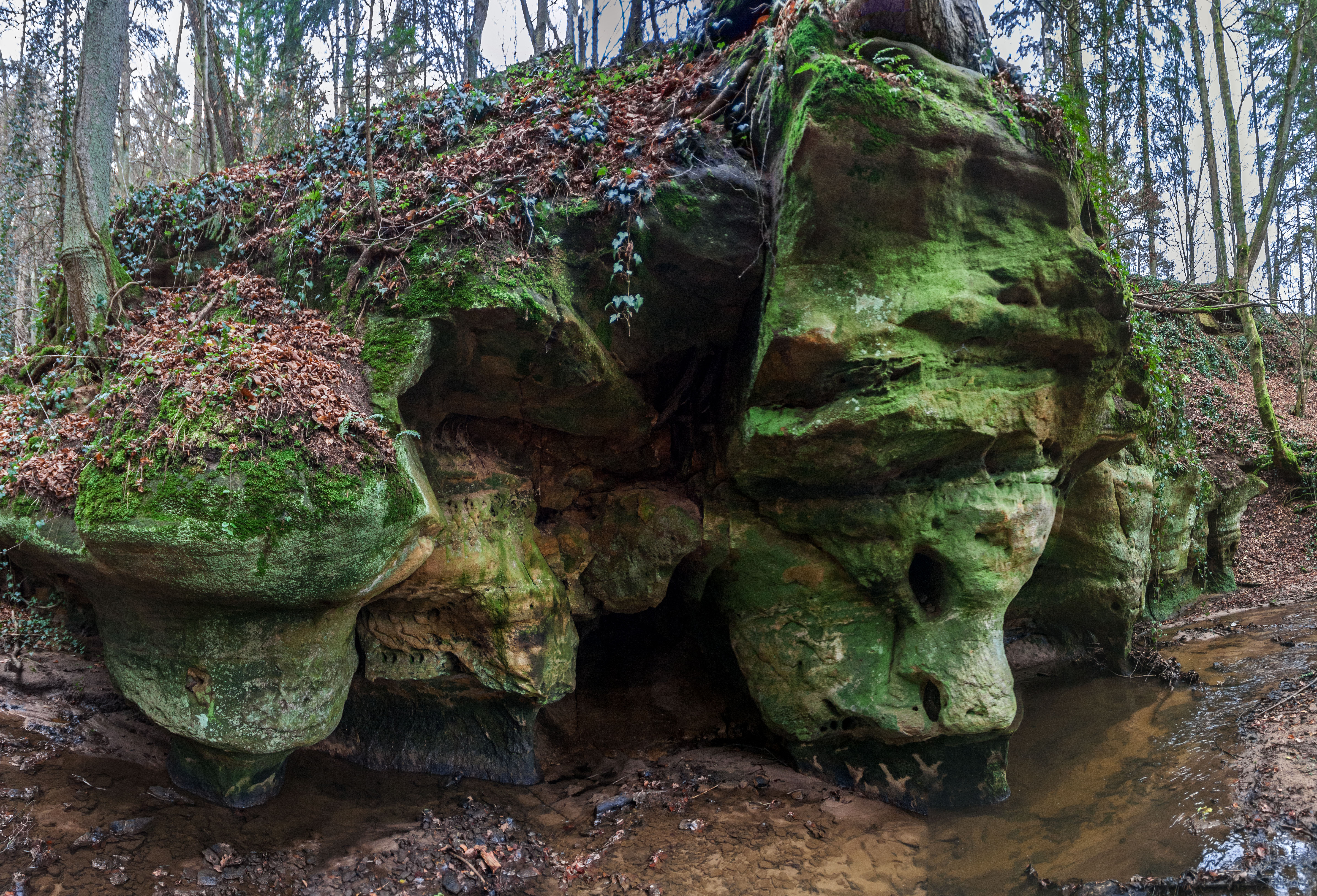 Rumpelbachschlucht, Röthenbach